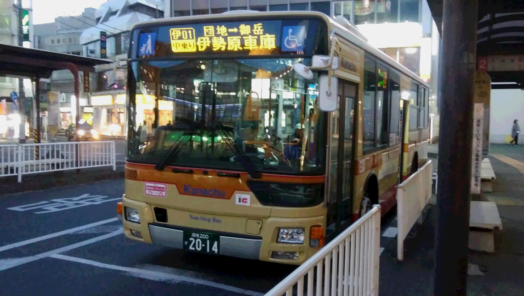 QKG-MP38FK い60